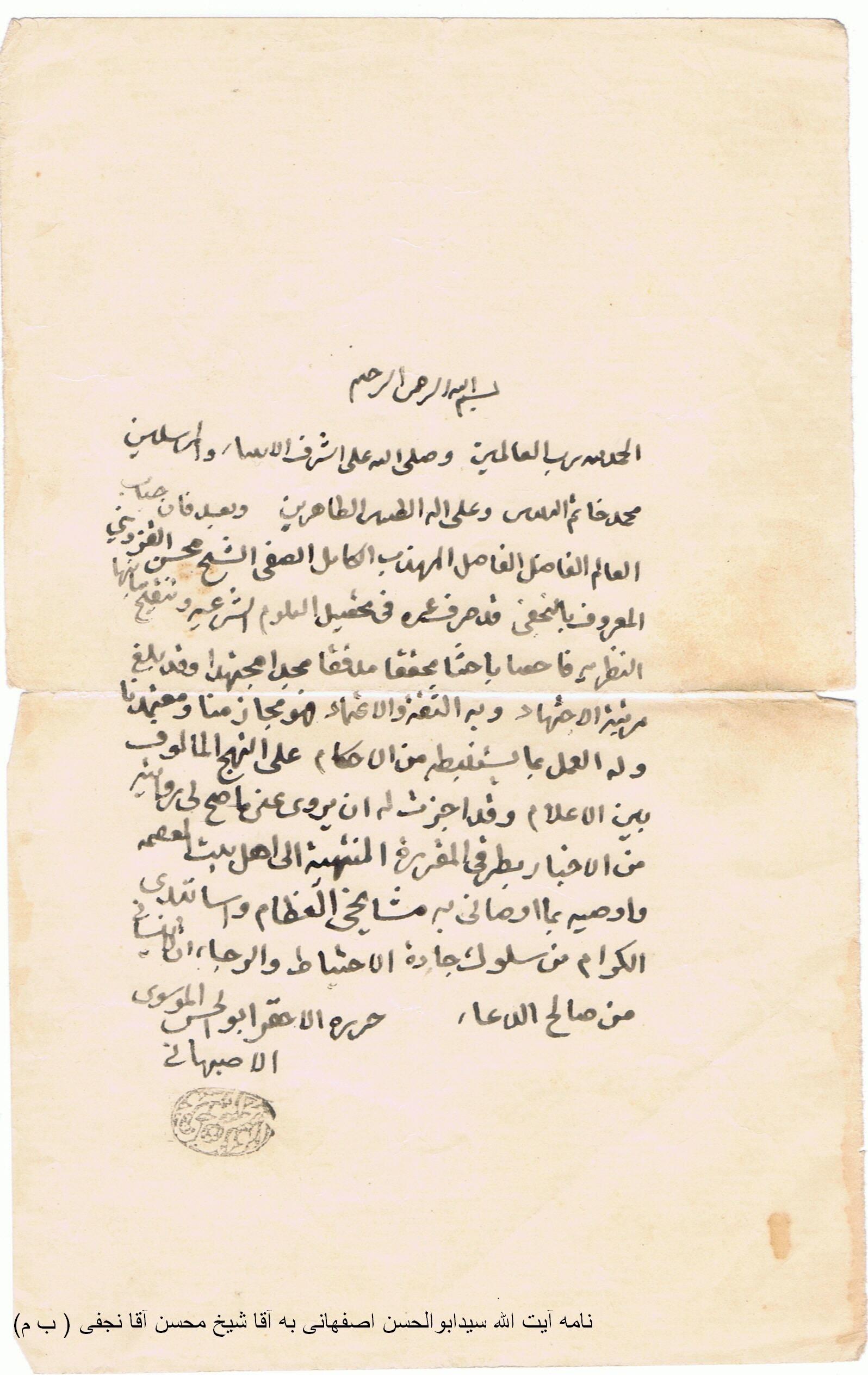 نامه ایت الله ابوالحسن اصفهانی به آقاشیخ محسن آقا نجفی